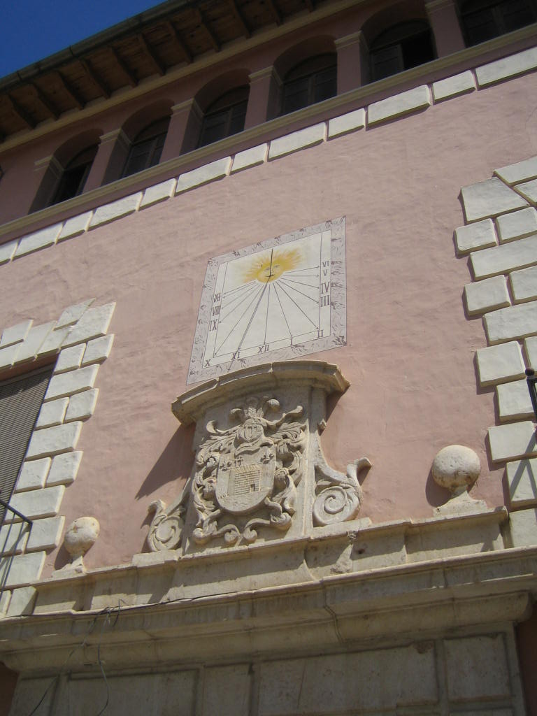 Escudo y reloj solar en la fachada del palacio de Casasús o Cassassús, Alzira (España).